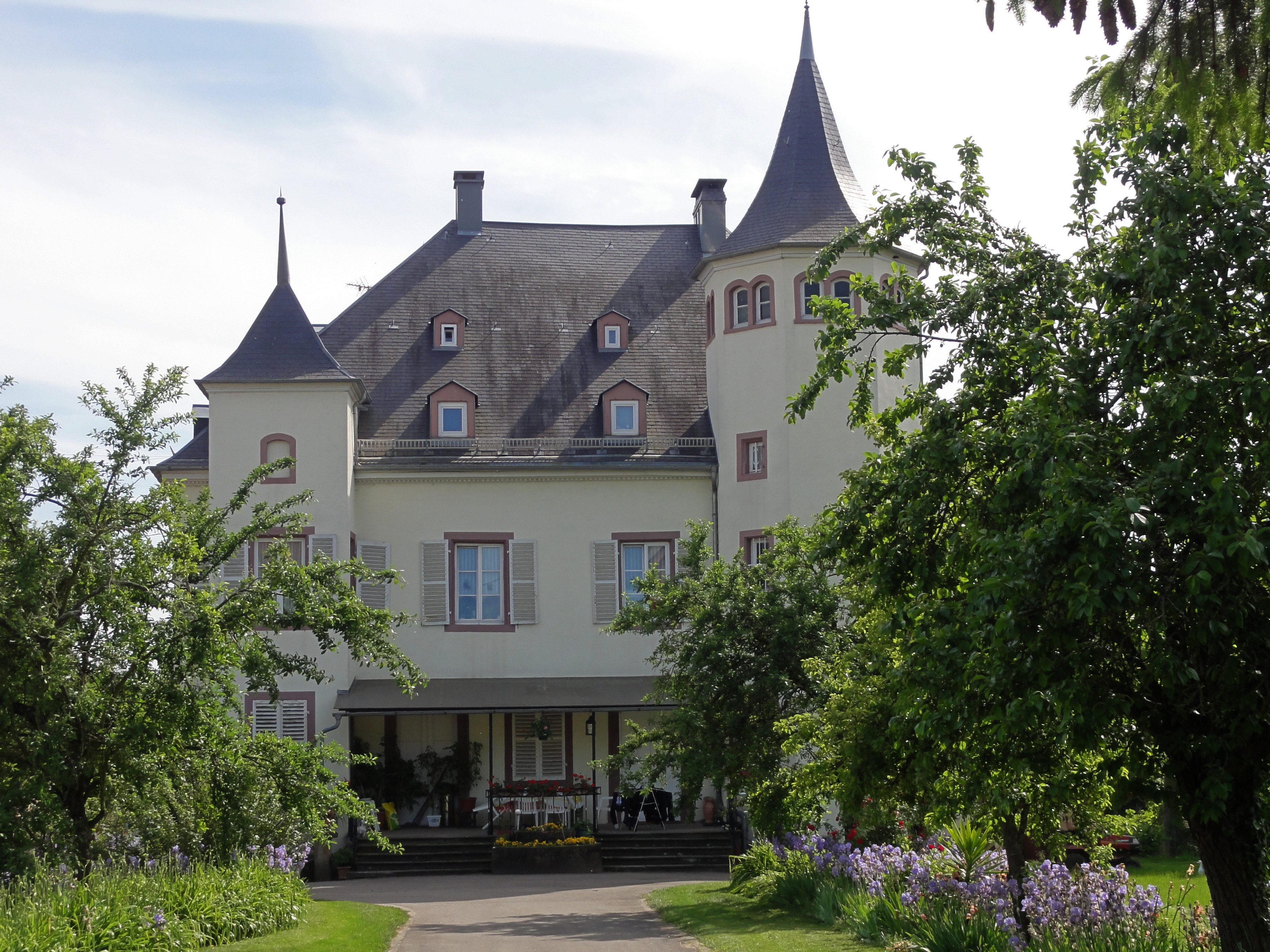 Alsace, Bas-Rhin, Geudertheim, Château de Schauenbourg (XVe au XIXe): .